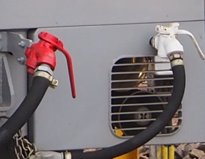 名鉄EL120形電気機関車ミュージックホーンのスピーカーのクローズアップ（豊明駅にて撮影）